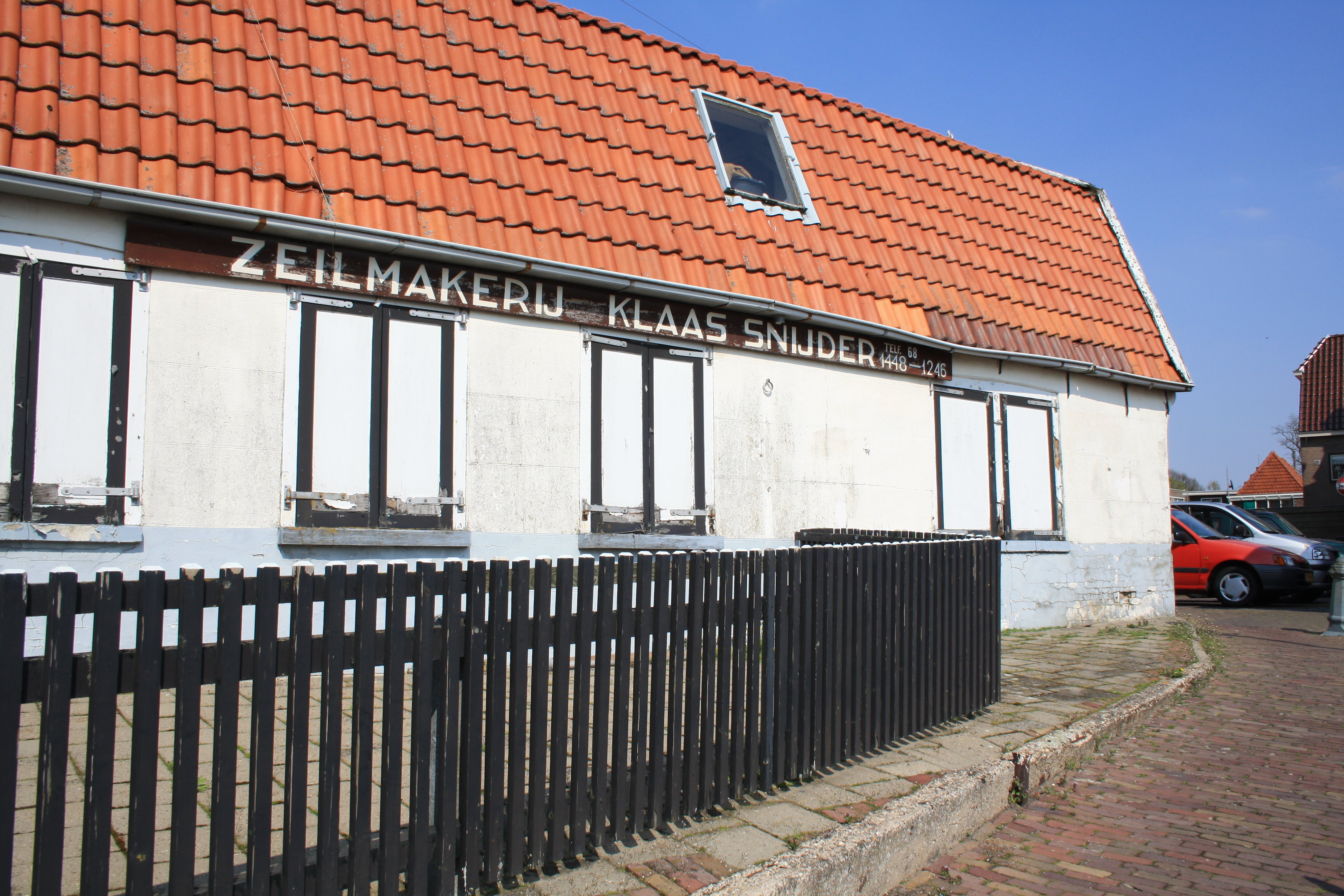 Oude zeilmakerij op Urk (Wijk 1 57)